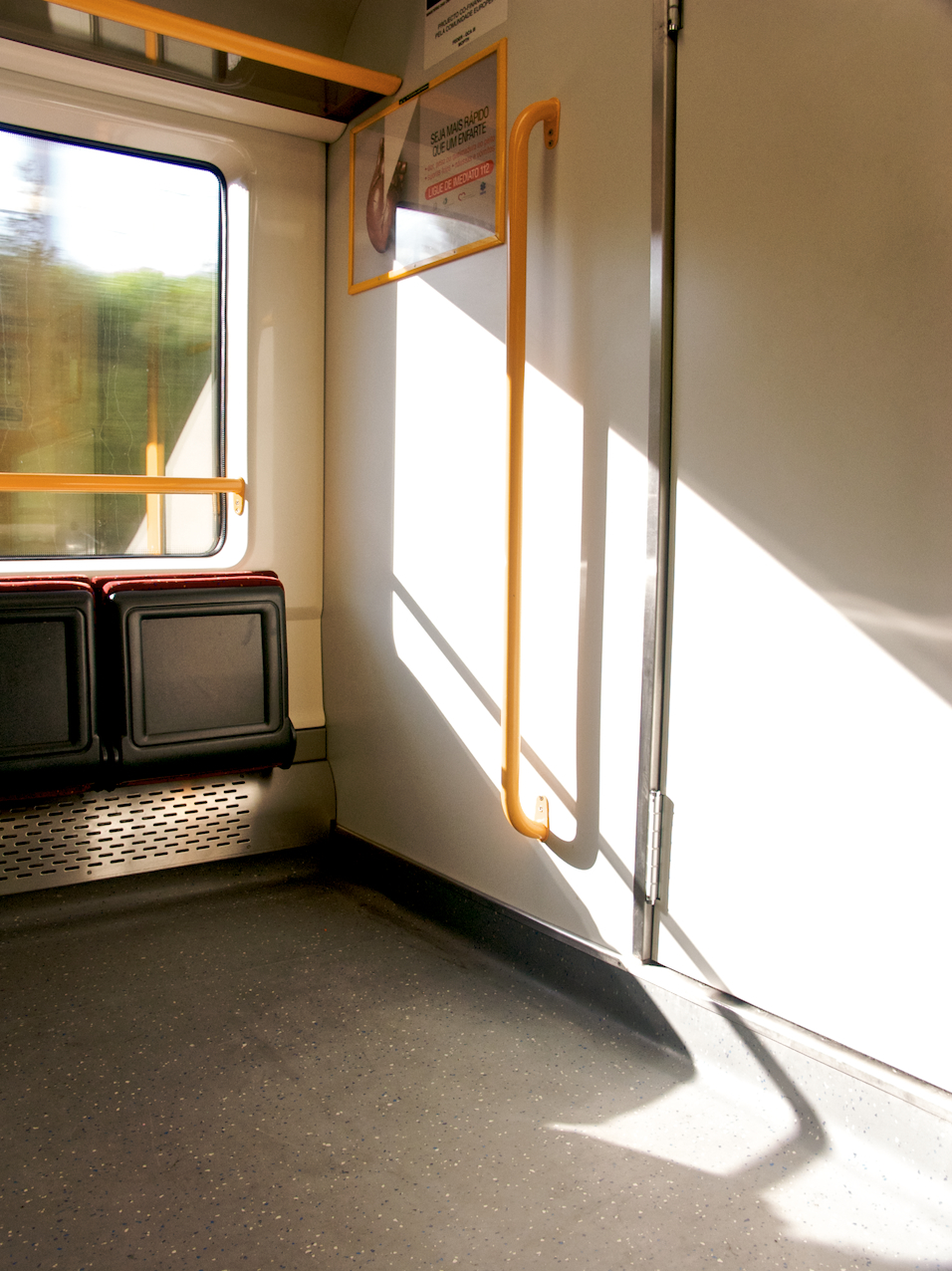 pormenor do interior da UME. Tipo: Comboio Urbano 15639/8 [Aveiro - Porto • São Bento] Local: passando na Aguda [Linha do Norte, PK 321] Data e hora: 16 de Junho de 2008 [17h59] Material: Automotora 34xx [Unidade Múltipla Eléctrica]